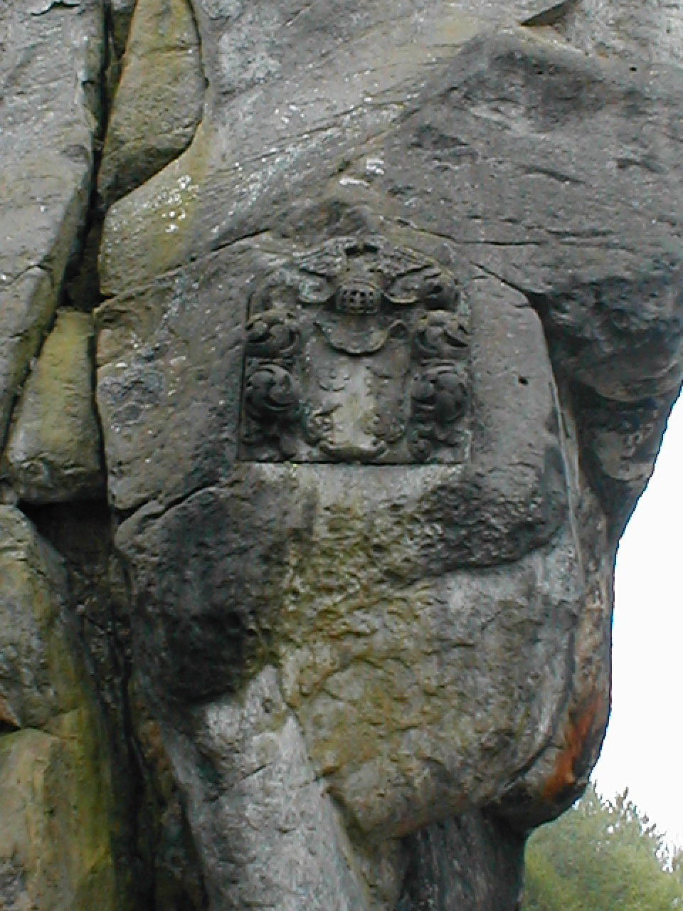 Lippisches Wappen an den Externsteinen